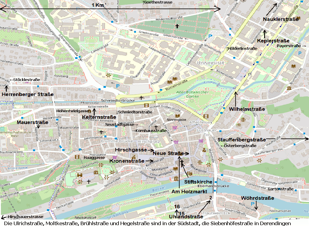 Stadtplan der Innenstadt von Tübingen mit Beschriftung der Stolpersteine. (Erstellt mit OpenStreetmap cc-by-sa.)